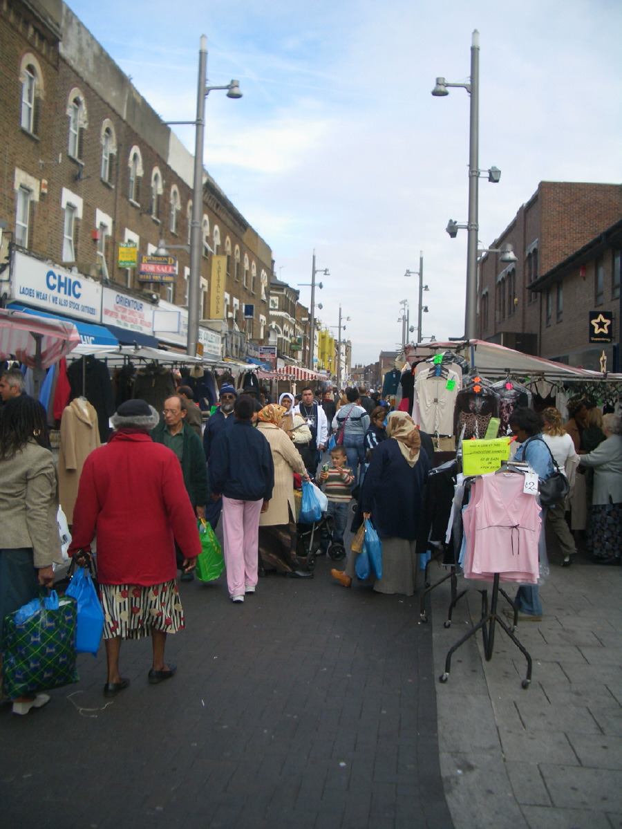 Walthamstow market, Oktober 2005.